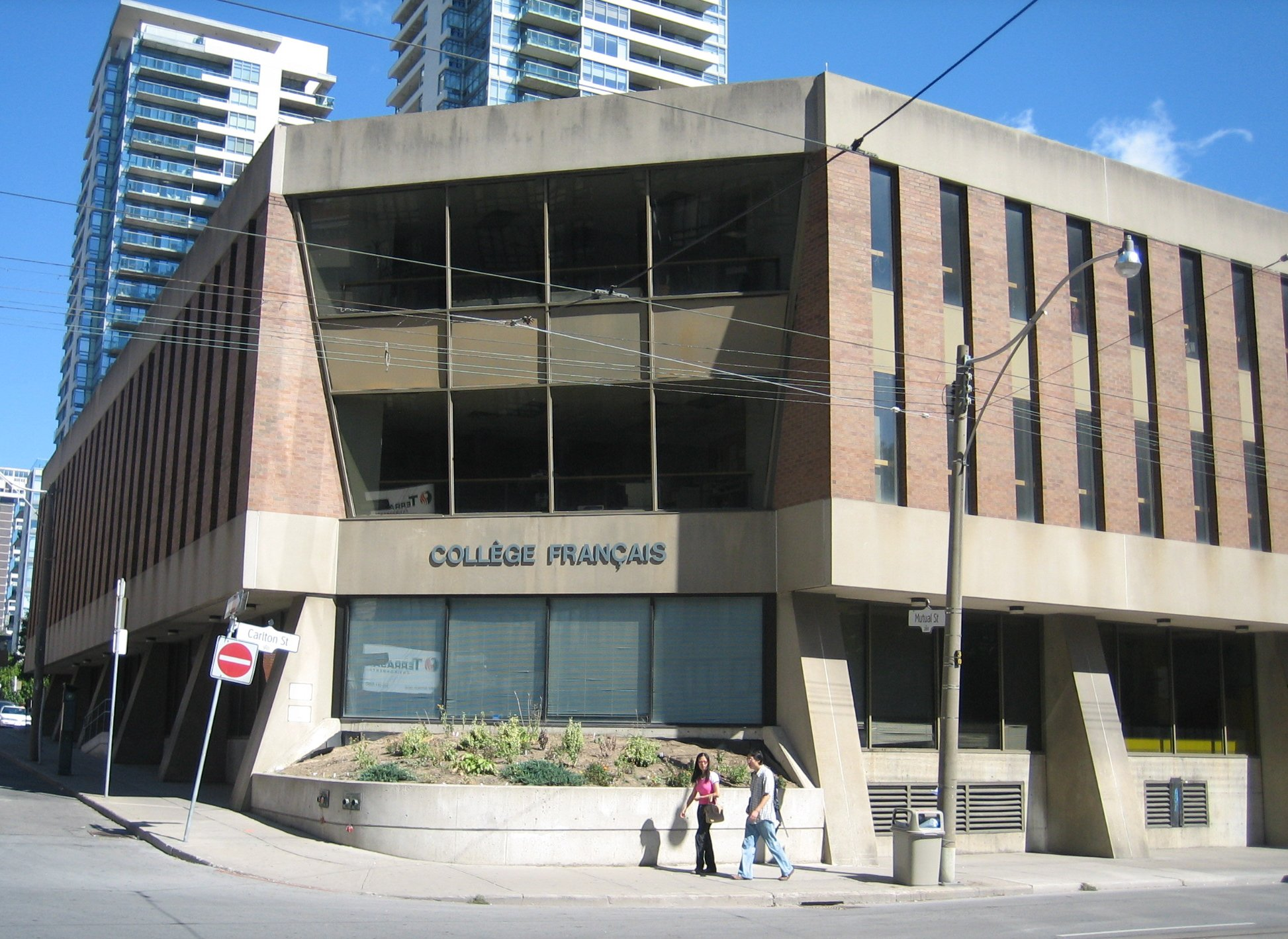 Le Collège français